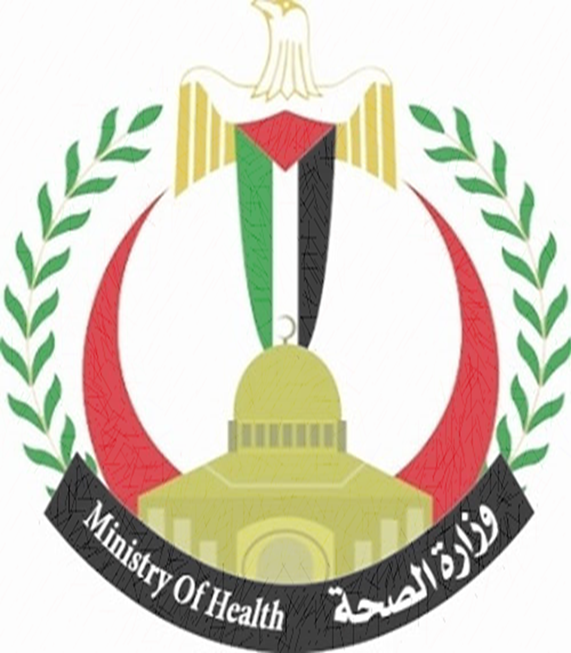 Logo of the Palestinian Ministry of Health